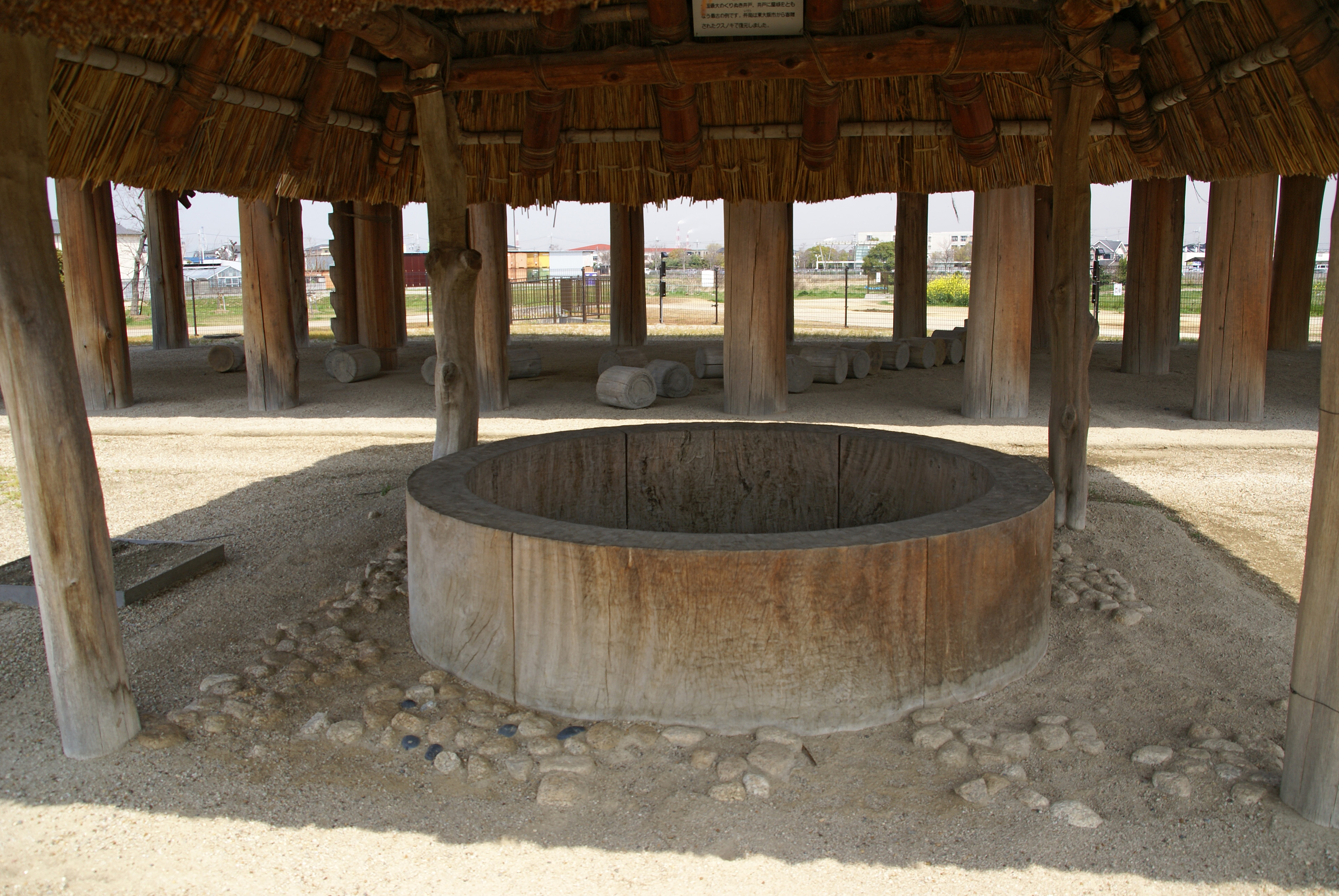 Ikegami-sone ruins in Izumi, Osaka prefecture, Japan